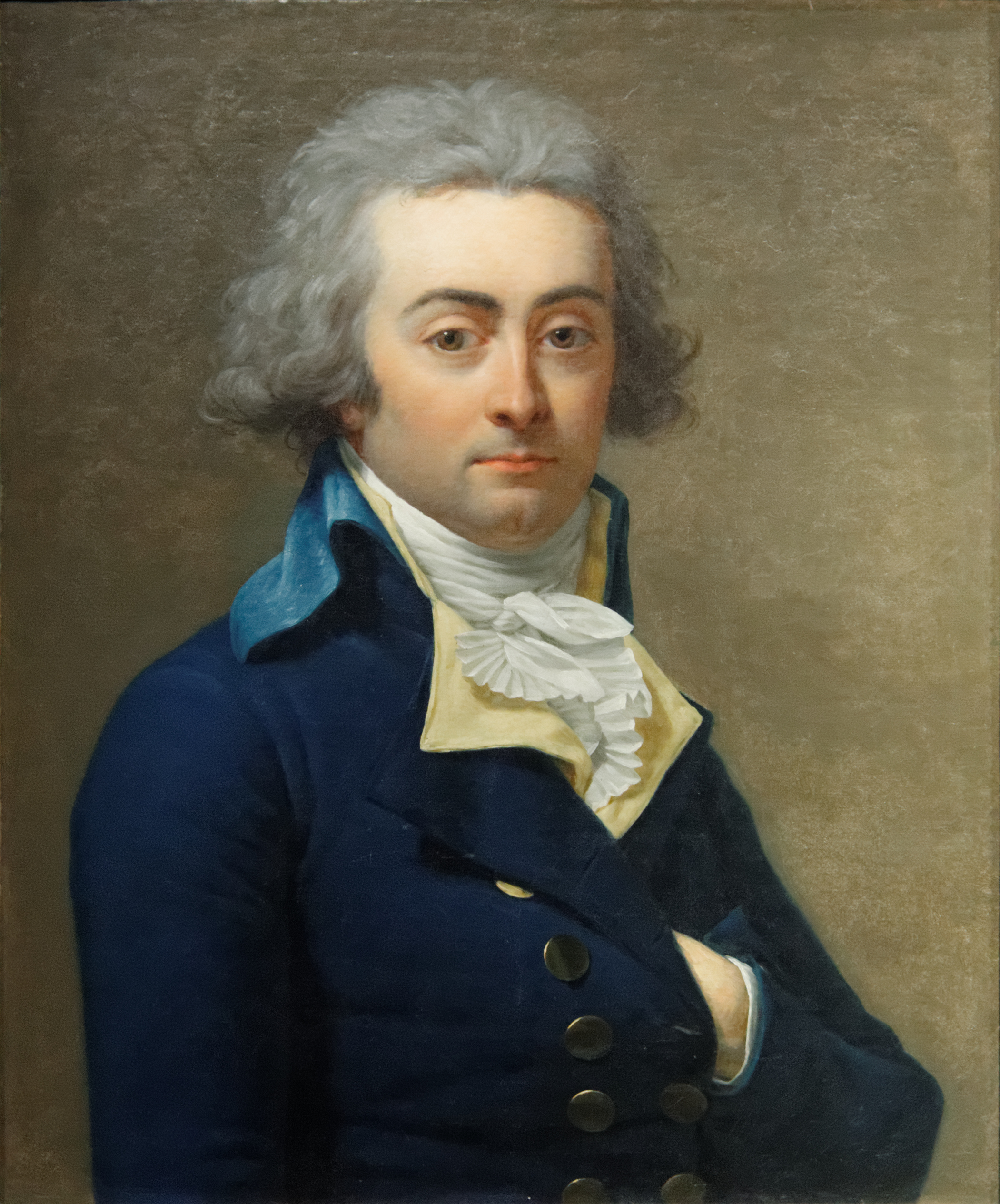 Il était président de la Convention en 1793, lorsqu'il rédigea le texte de la Constitution dite de l'an I (adoptée le 24 juin 1793). Membre du Comité de salut public, il contribua à organiser la Terreur ; mais, ami de Danton et lié aux hébertistes, il fut, comme eux, condamné par le tribunal révolutionnaire et guillotiné en avril 1794.